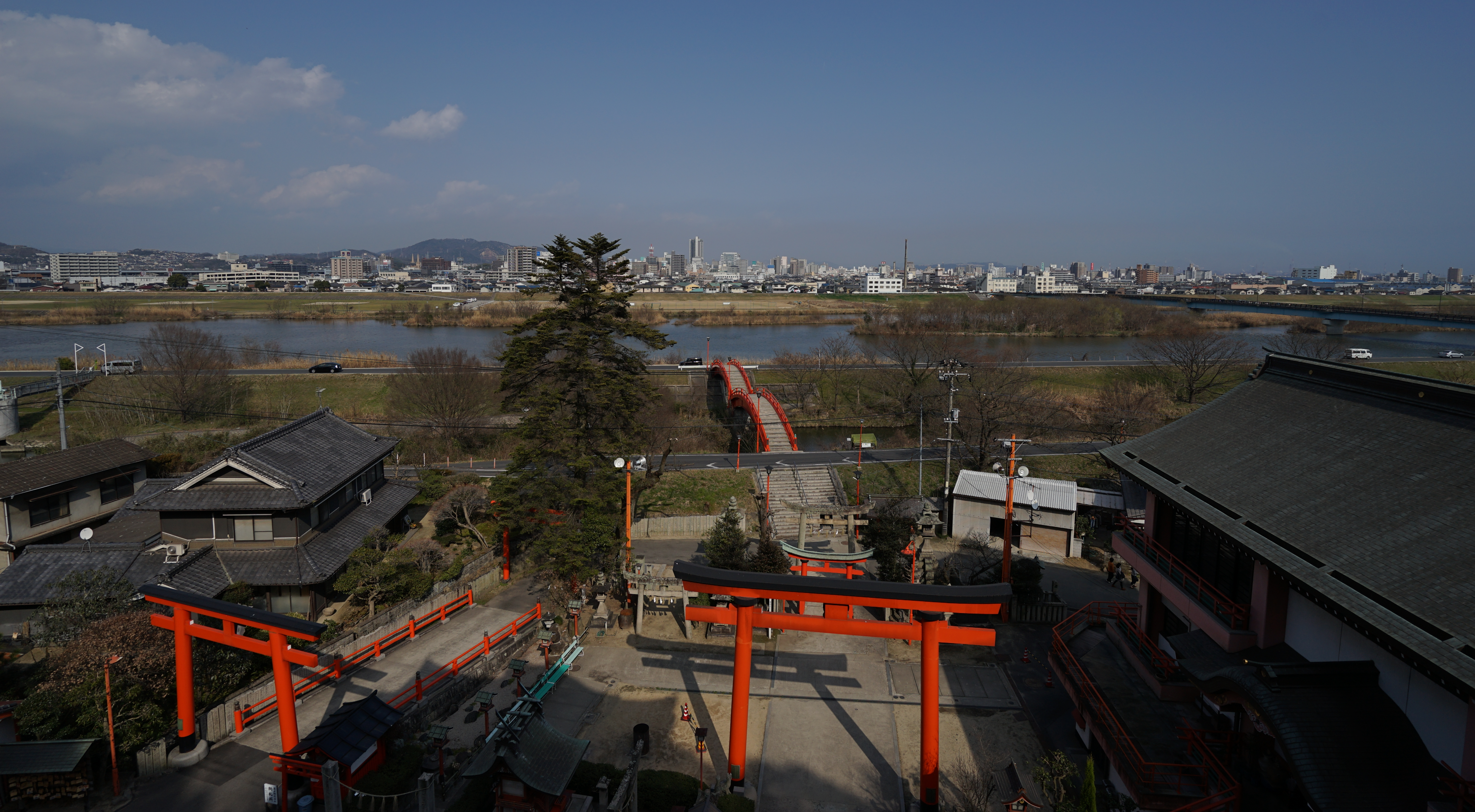 草戸稲荷神社本殿から見た福山市（芦田川を挟む）